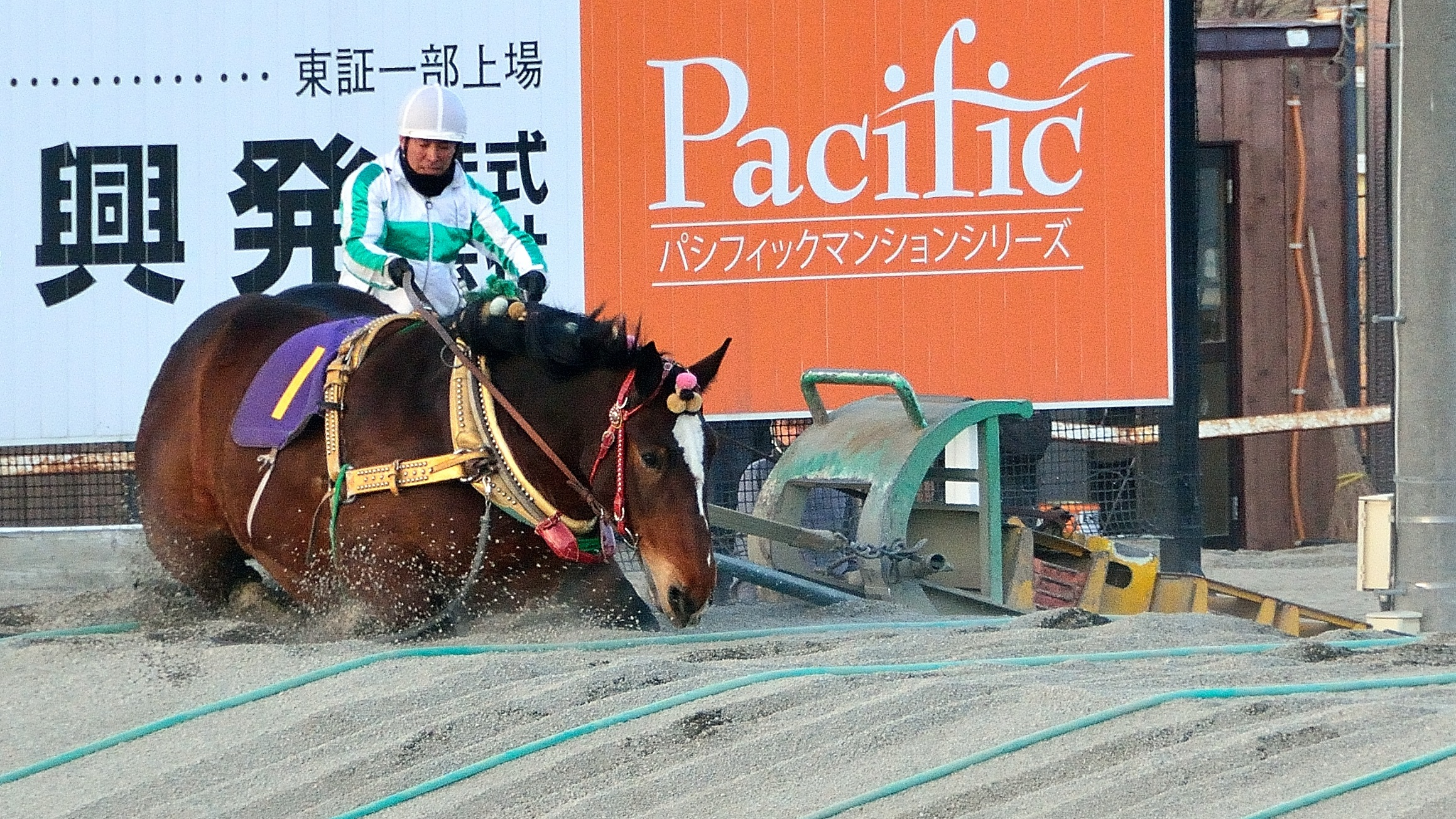 ばんえい記念の第2障害でうずくまるフクドリ（2016年3月20日）